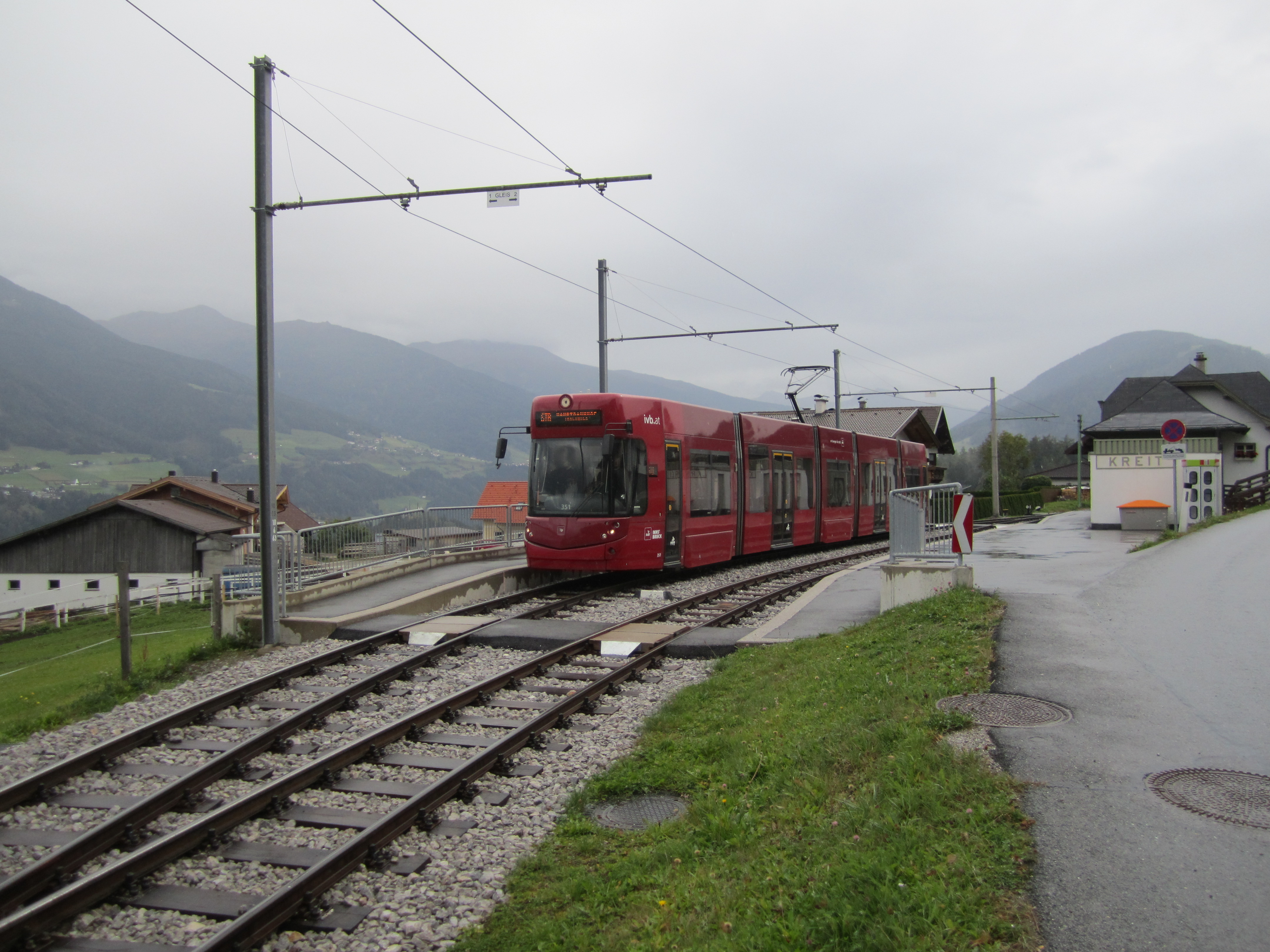 Zug der Stubaitalbahn im Bahnhof Kreith